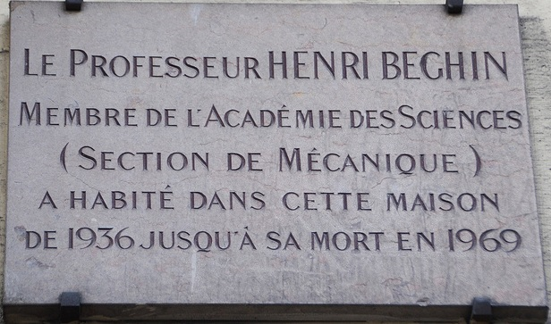 Plaque Henri Beghin bd Raspail